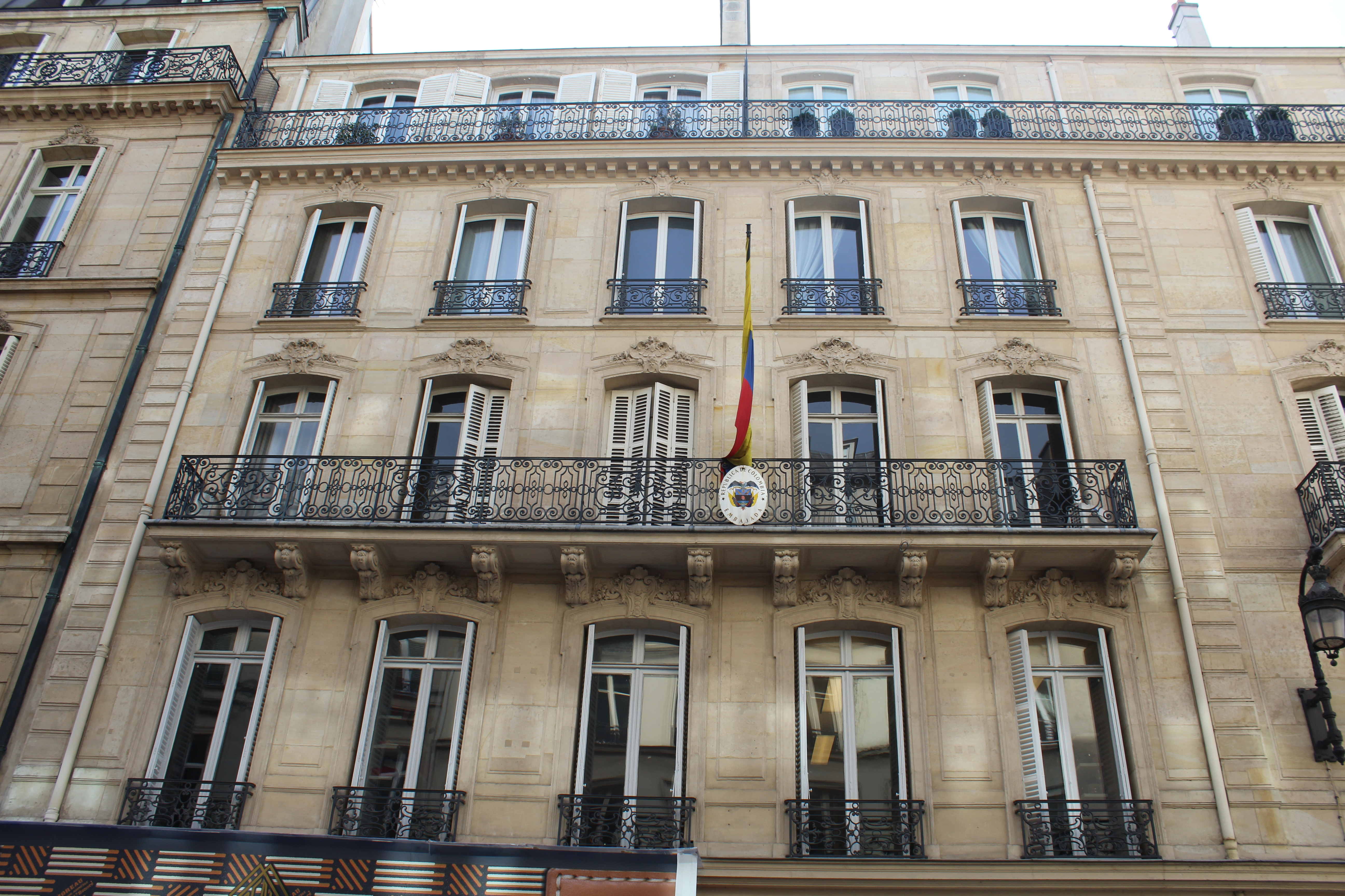 Ambassade de la Colombie à Paris.